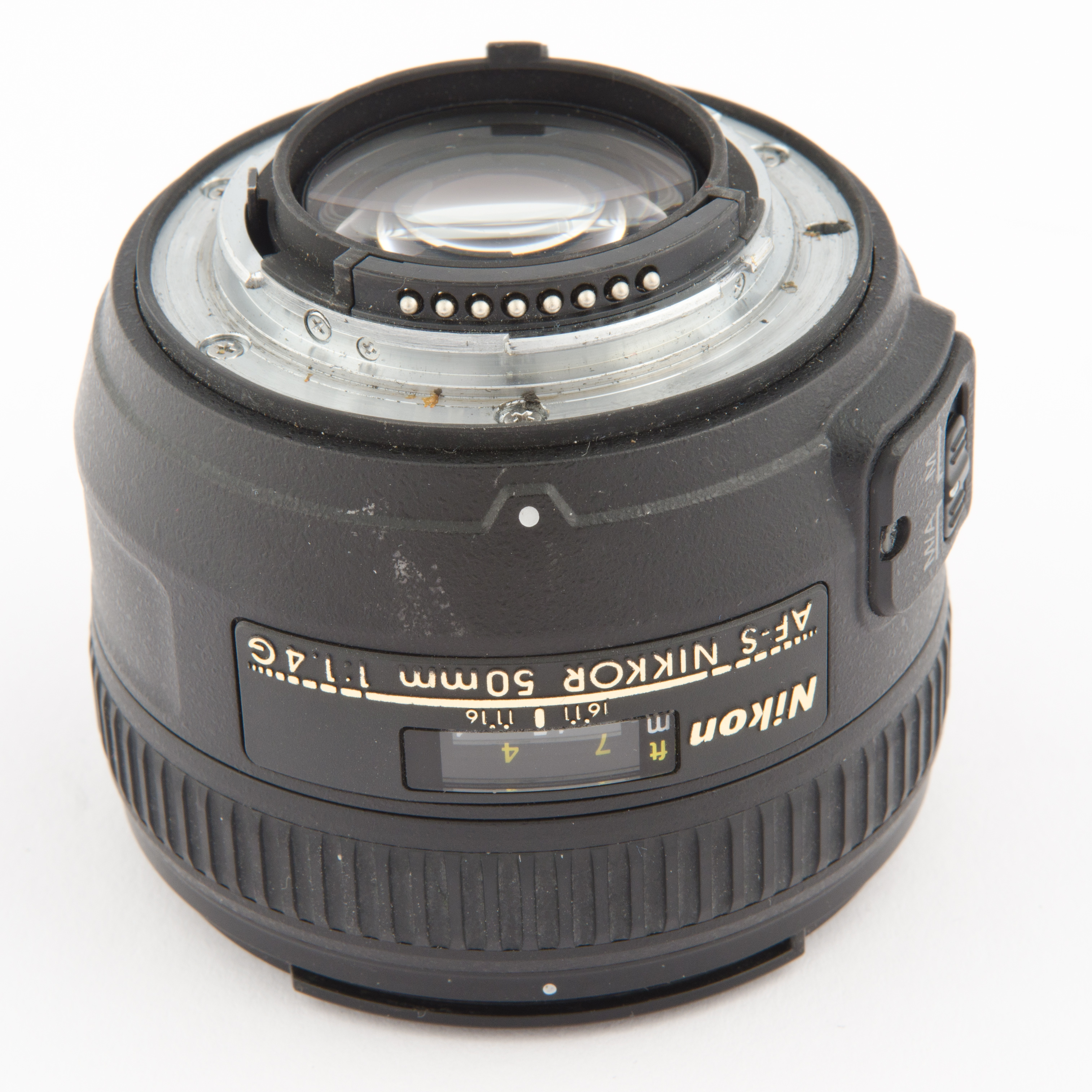 Festbrennweite Objektiv Nikkor 1,4/50